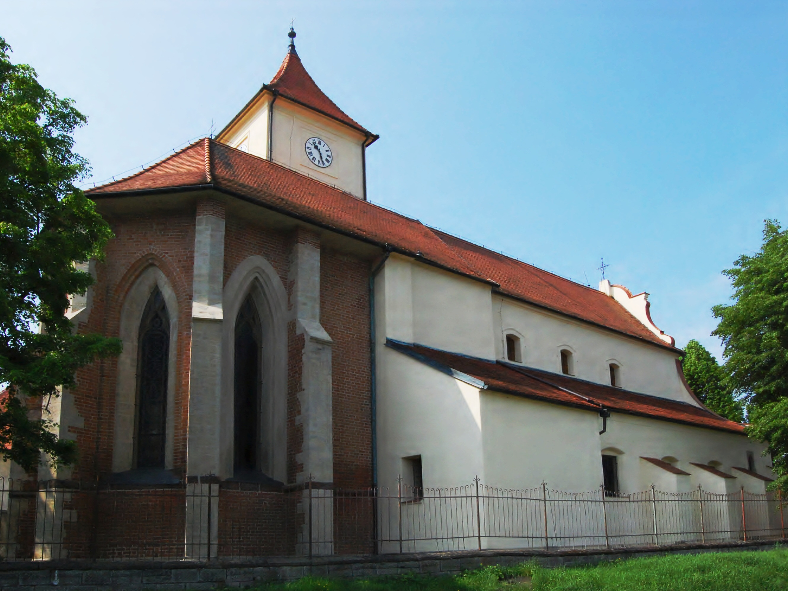 Kostel sv. Markéty (Loděnice), Loděnice